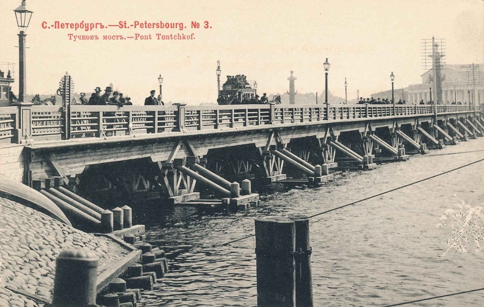 Деревянный Биржевой мост через Малую Неву в Санкт-Петербурге